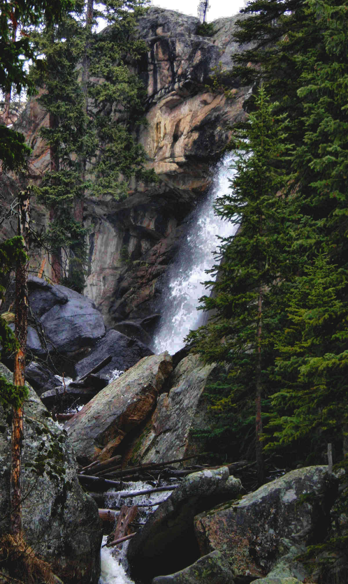 Ouzel Falls